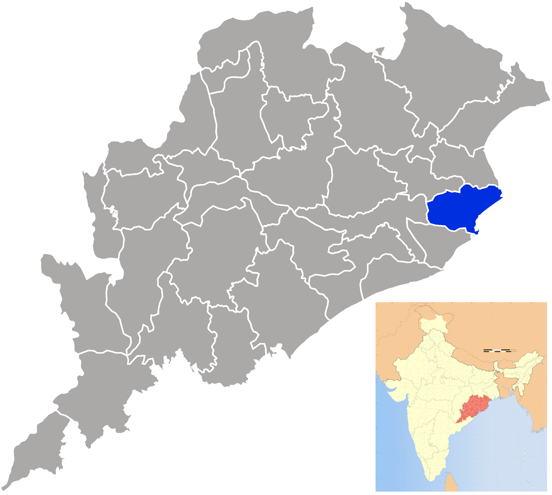 Distrito de Kendrapara en Orissa